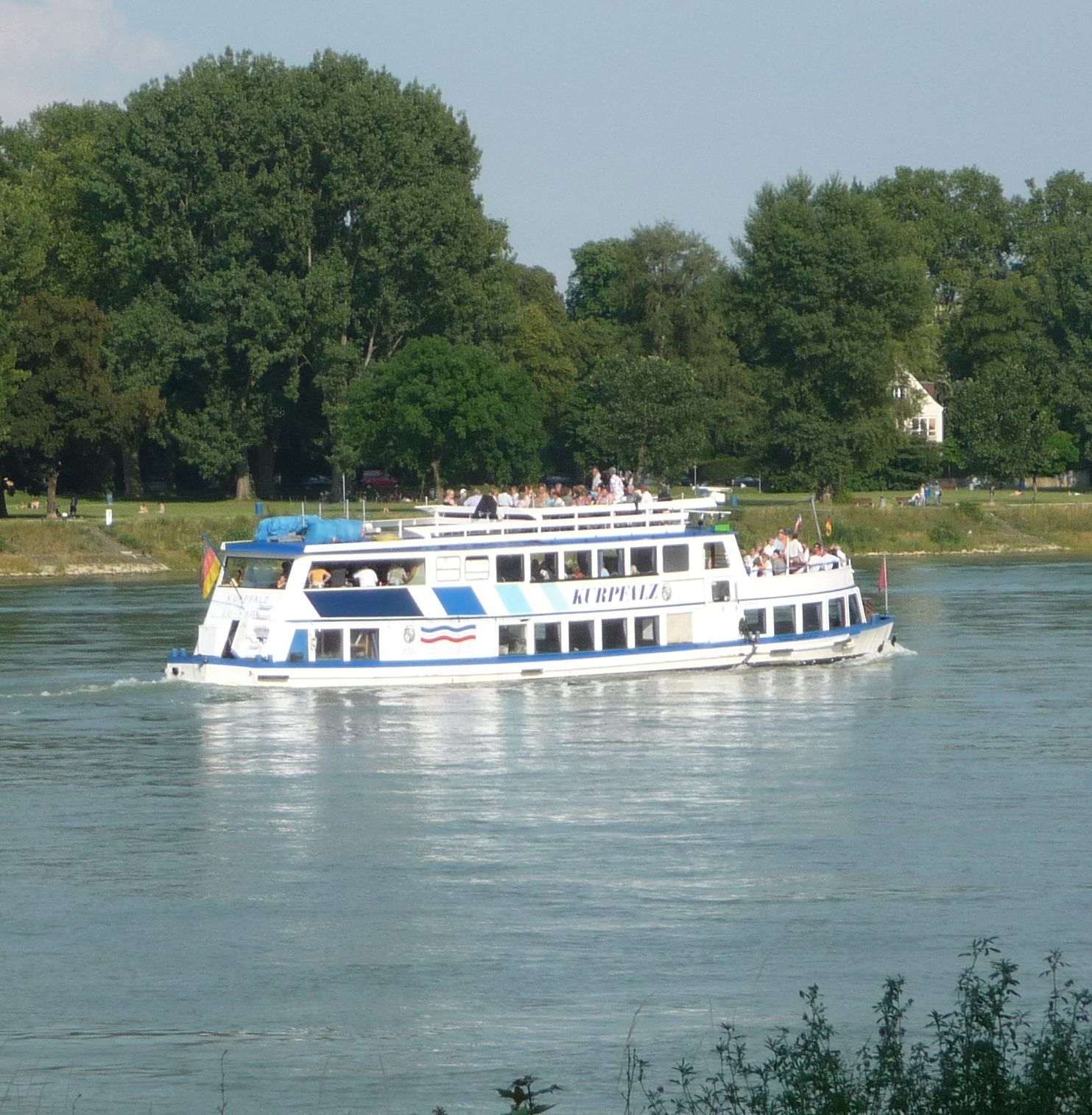 Das Ausflugsschiff Kurpfalz vor dem Mannheimer Stephanienufer